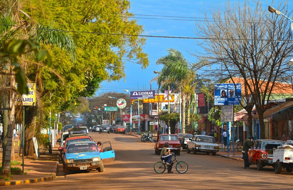 La Av. Lavalle, la más comercial.